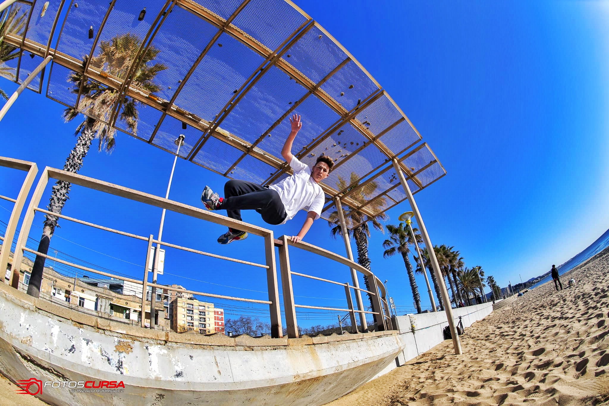 Traceur haciendo un pasavallas